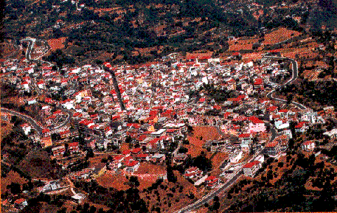 Panoramica di Ilbono